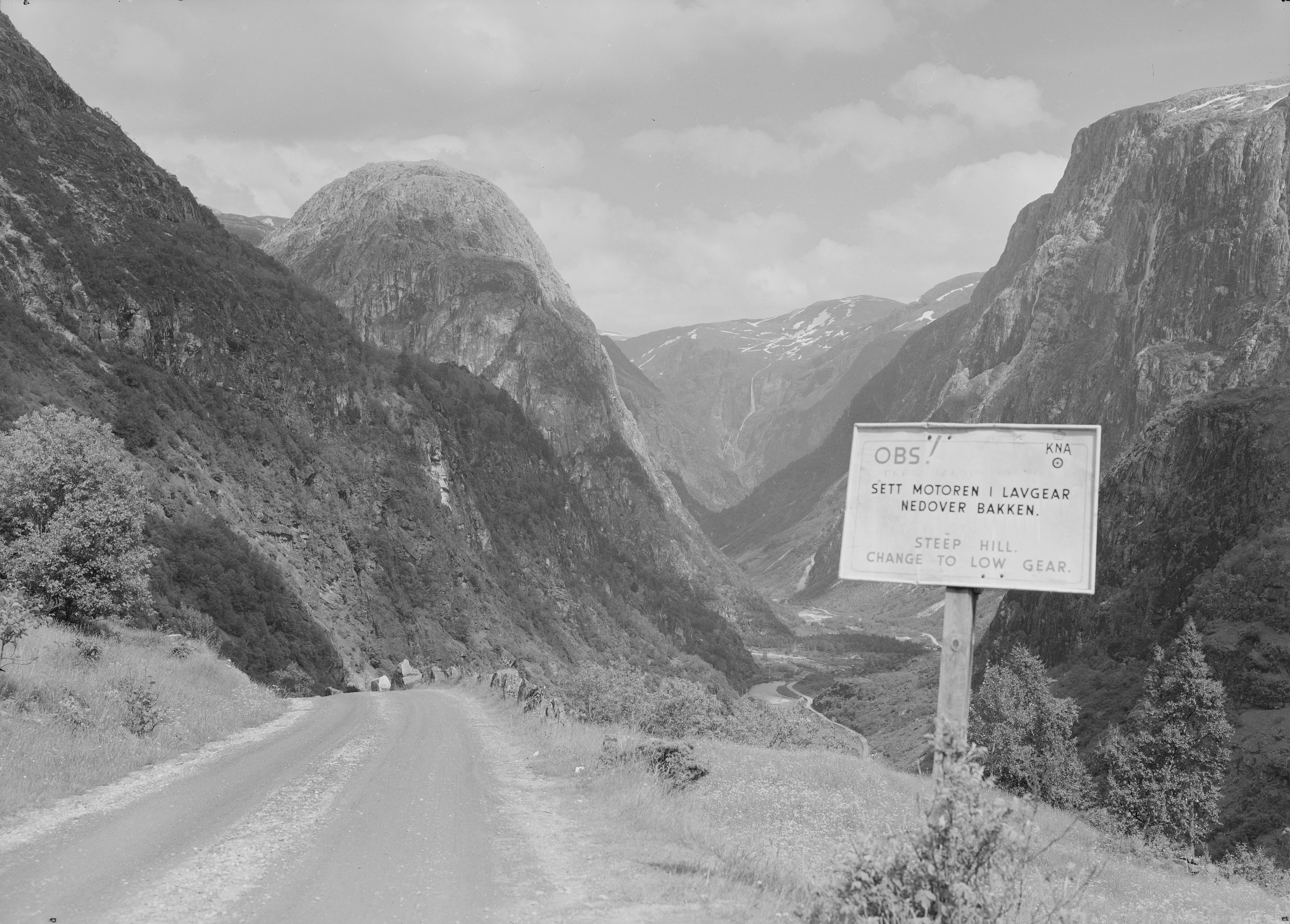 Bildet er hentet fra Nasjonalbibliotekets bildesamling. Anmerkninger til bildet var: Fotograf : ukjent Nærøydalen,Stalheim, Voss, Aurland, Hordaland, Sogn og Fjordane